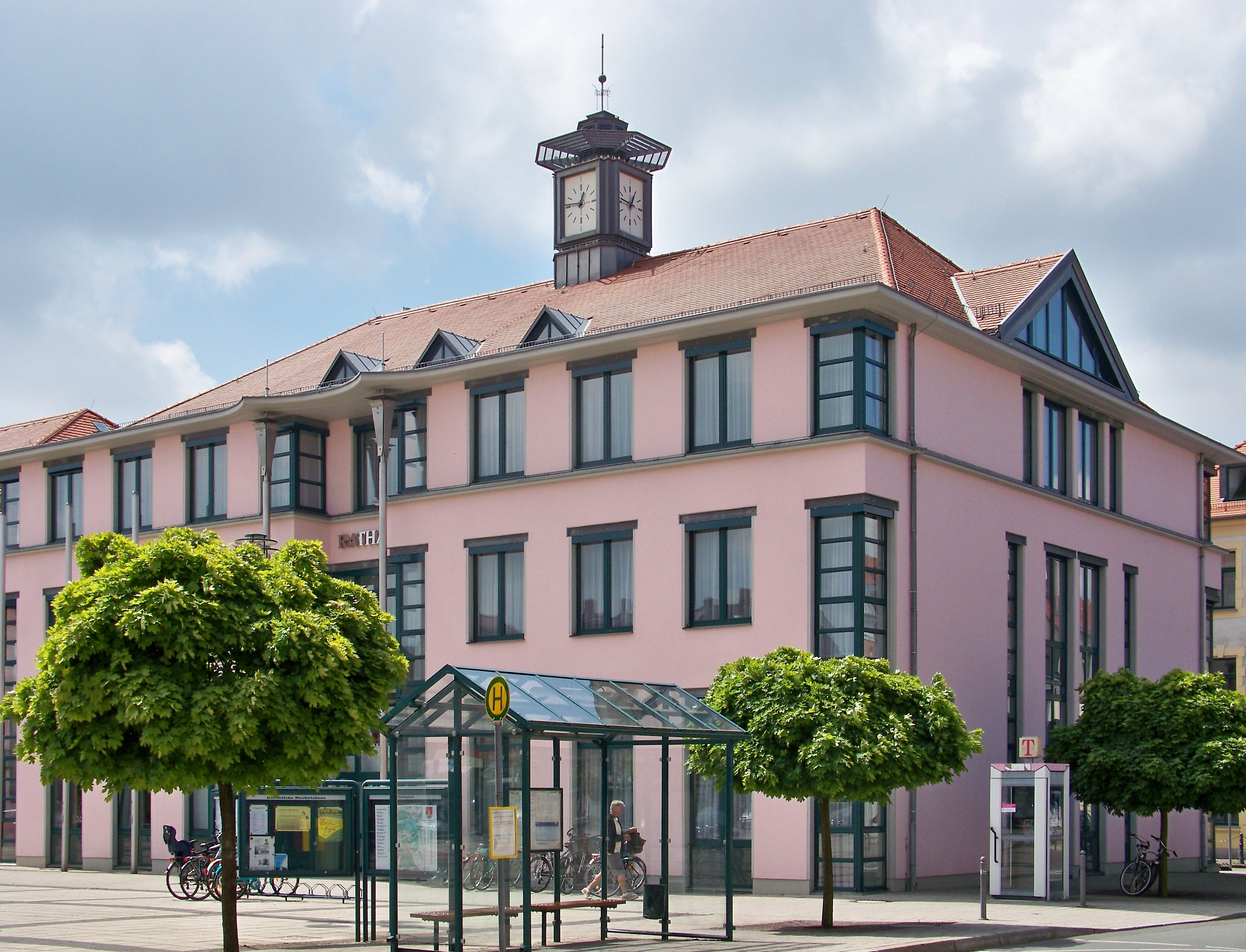 Rathaus von Naunhof in Sachsen